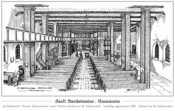 Das Innere der St. Bartholomäuskirche im 18. Jahrhundert